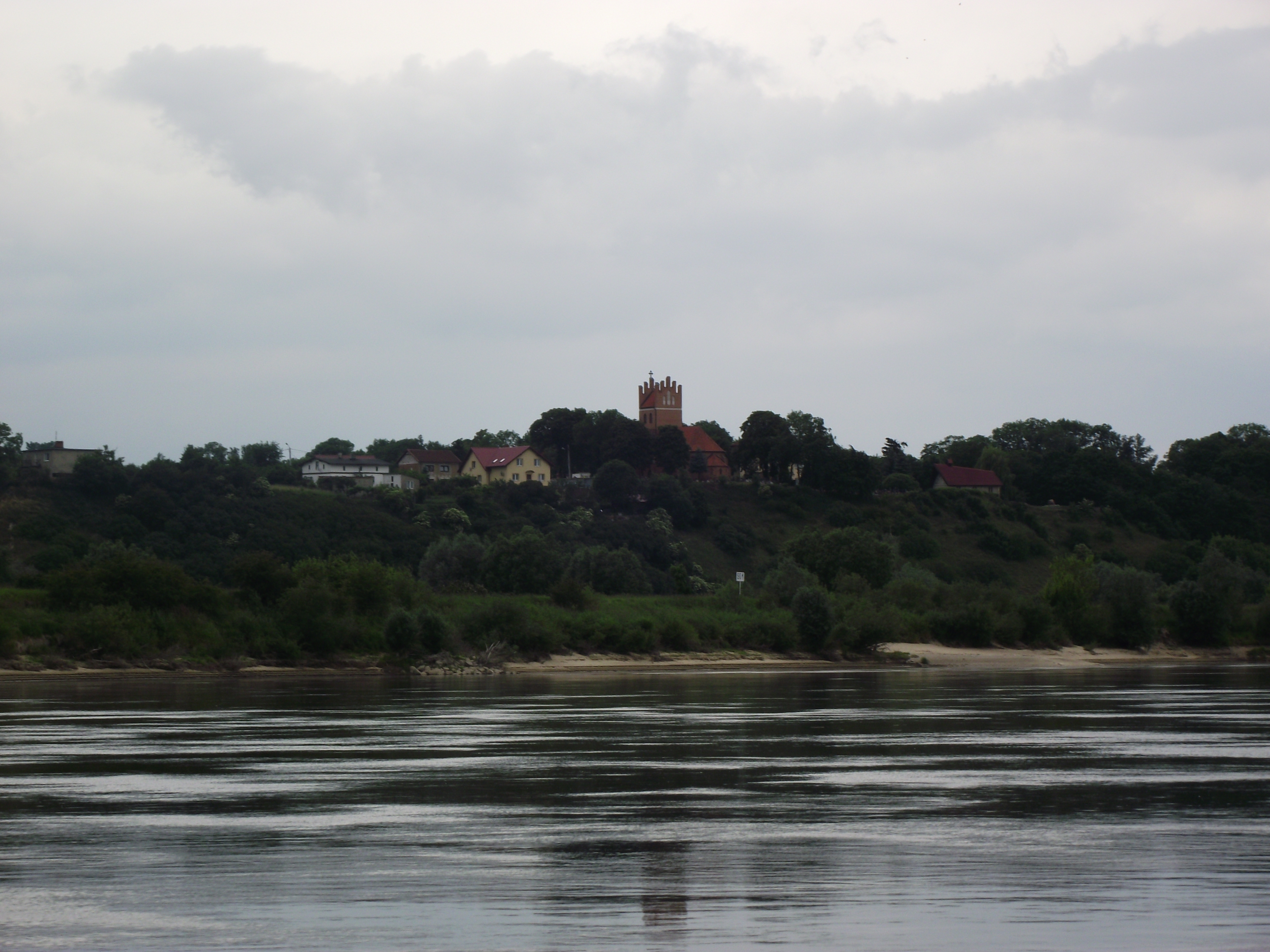 Wieś Gorzędziej leżąca nad Wisłą